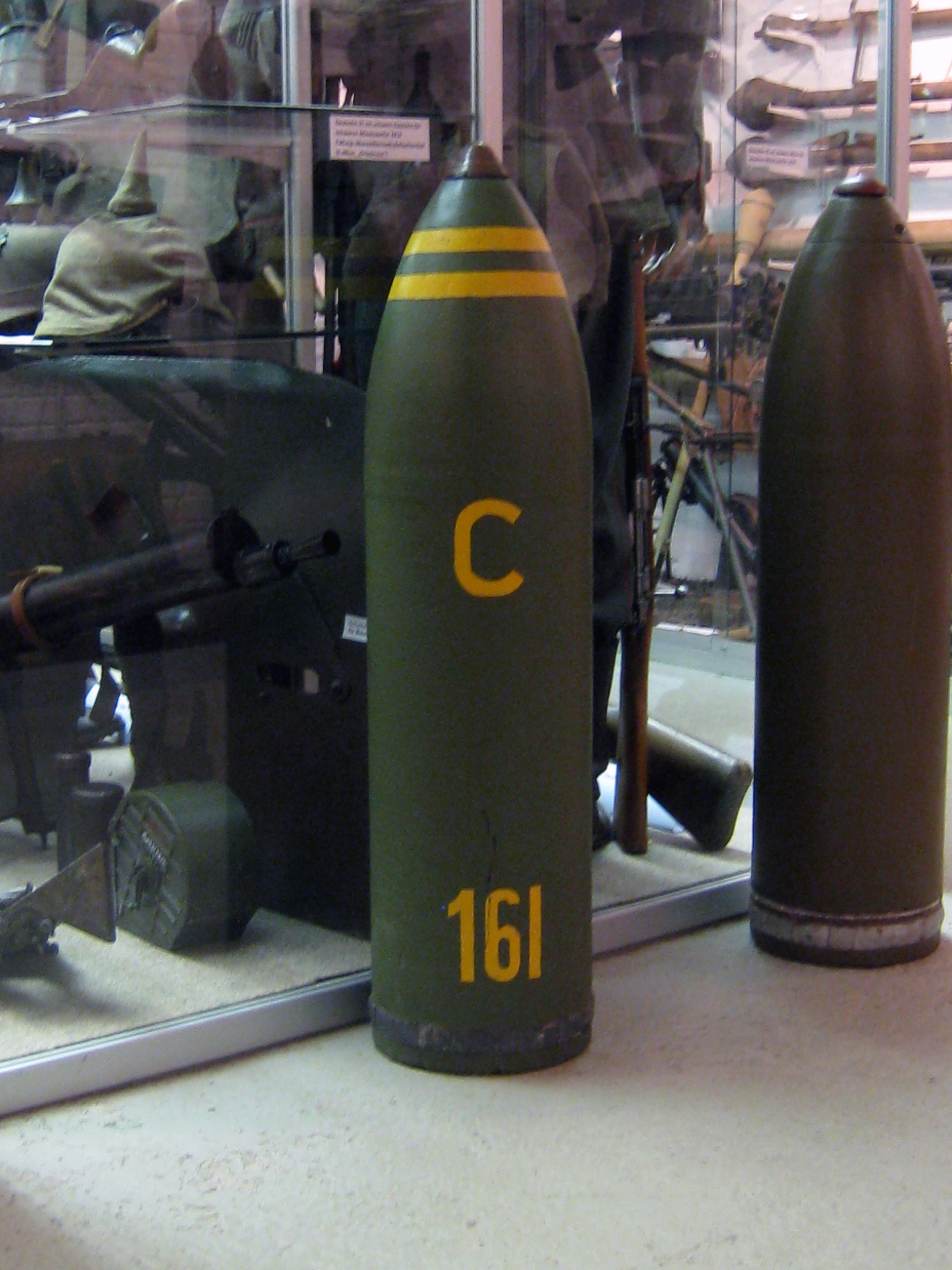 deutsche Grünkreuz-Giftgranate im Festungsmuseum Reuenthal